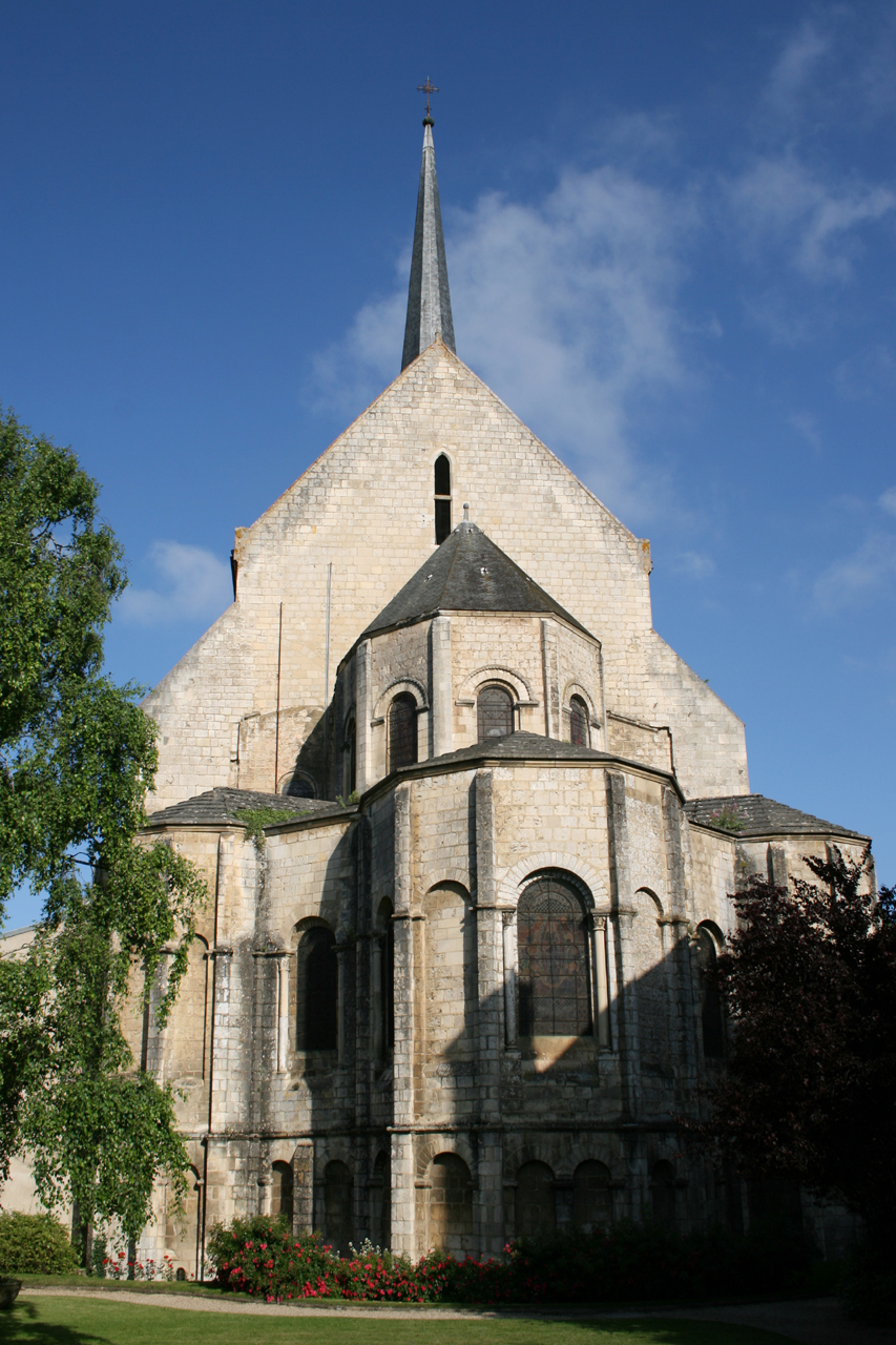 Eglise Sainte Radegonte a Poitiers